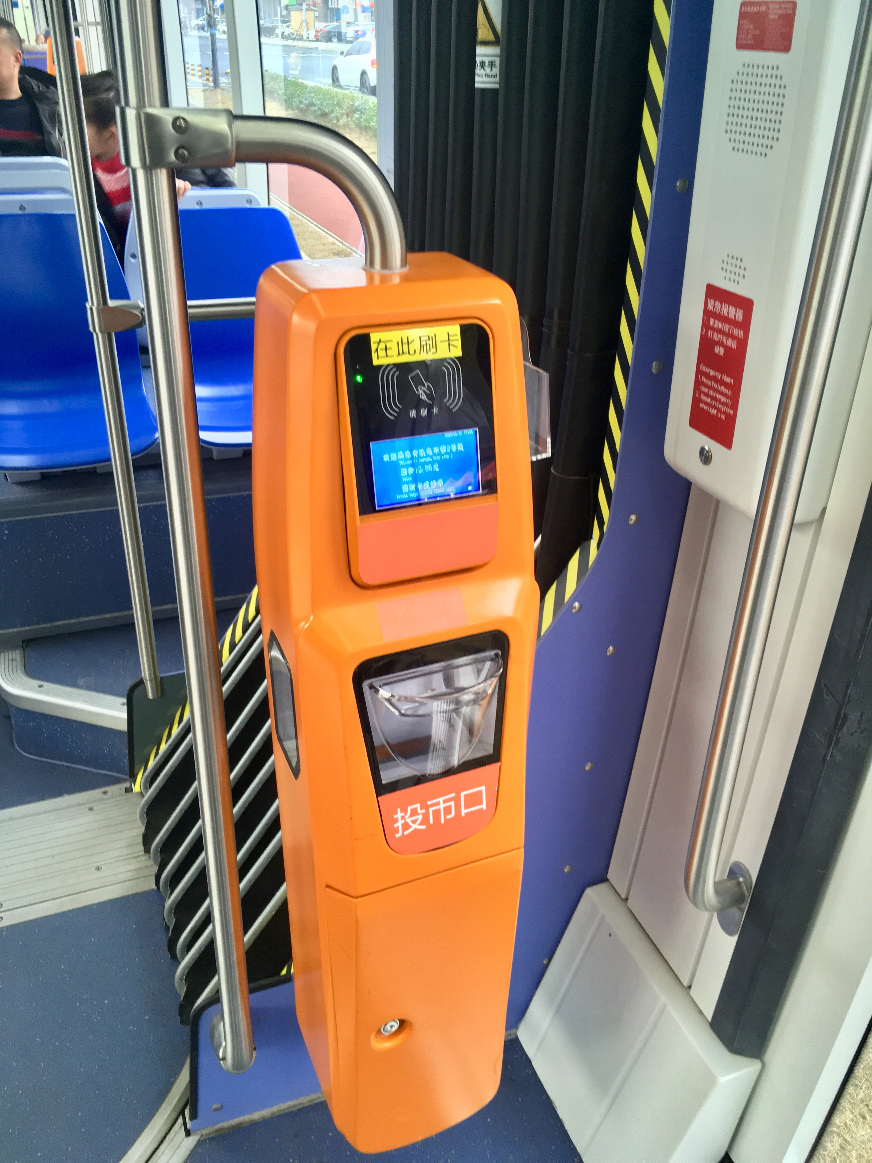 蓉2号线列车刷卡投币器